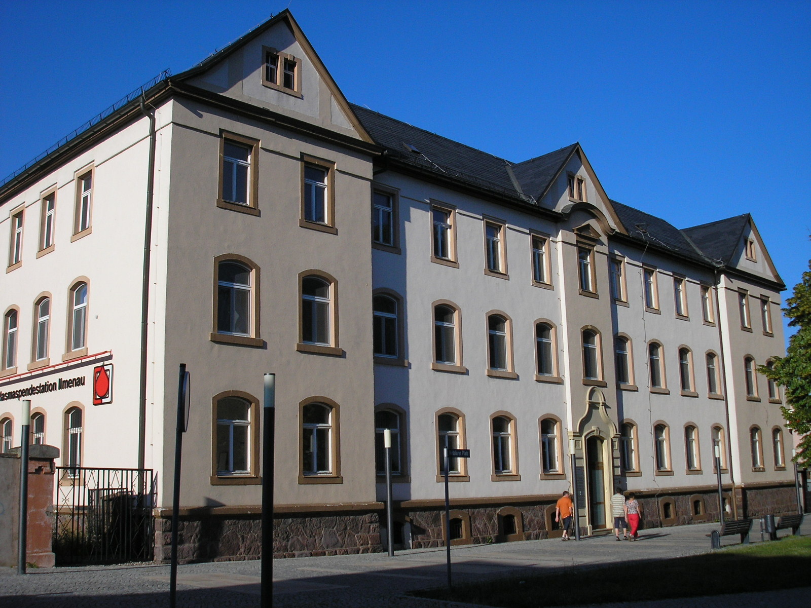 Das Gebäude des ehem. Landratsamts des Kreis Ilmenau (Thüringen).